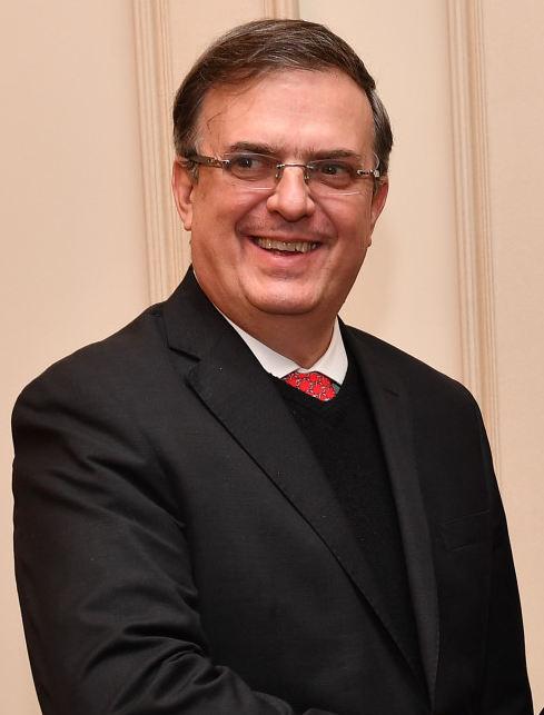 El Secretario de Estado de los Estados Unidos Mike Pompeo y el Secretario de relaciones exteriores de México Marcelo Ebrard.